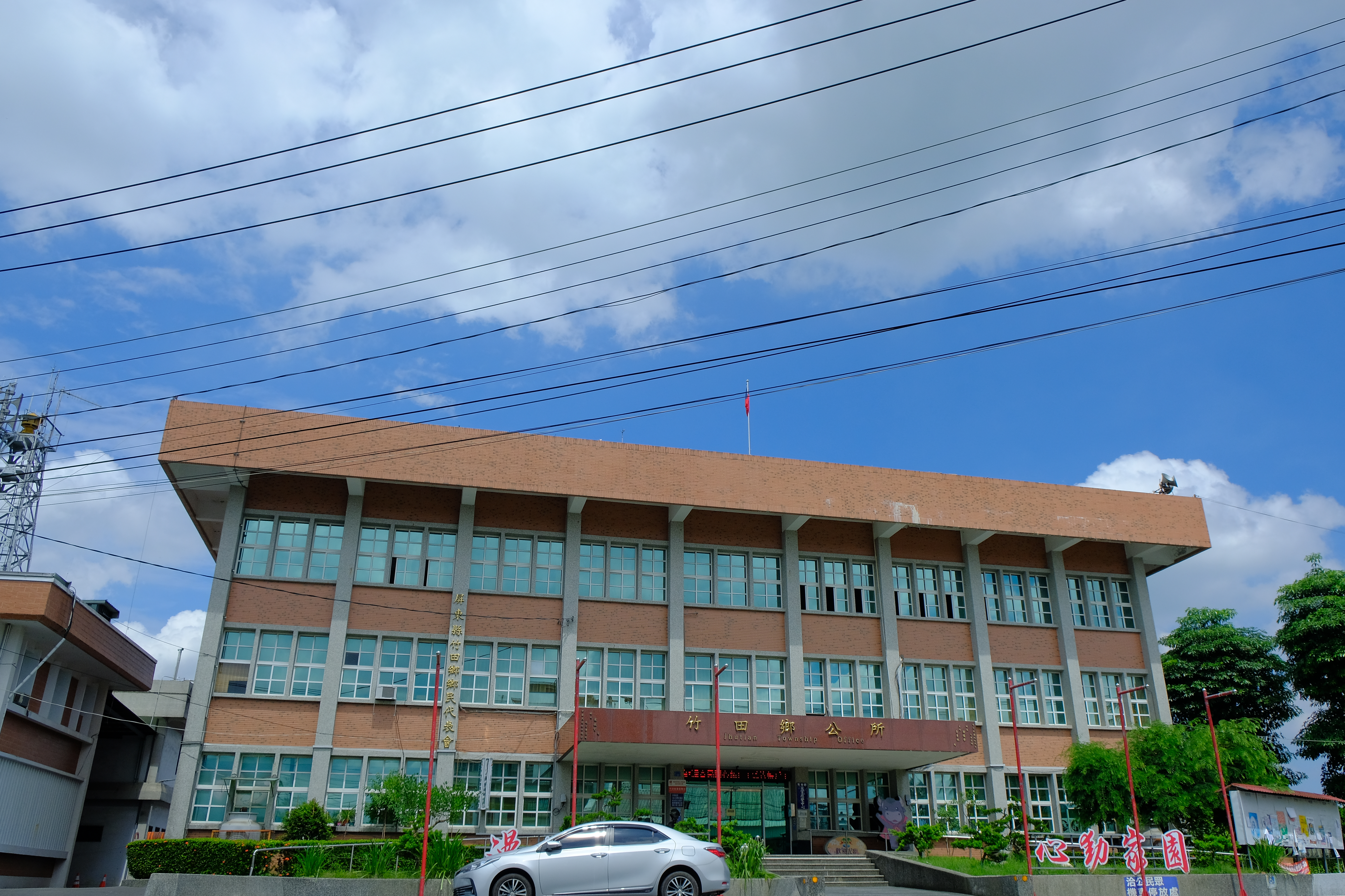 2019 Jhutian Township Office 竹田鄉公所